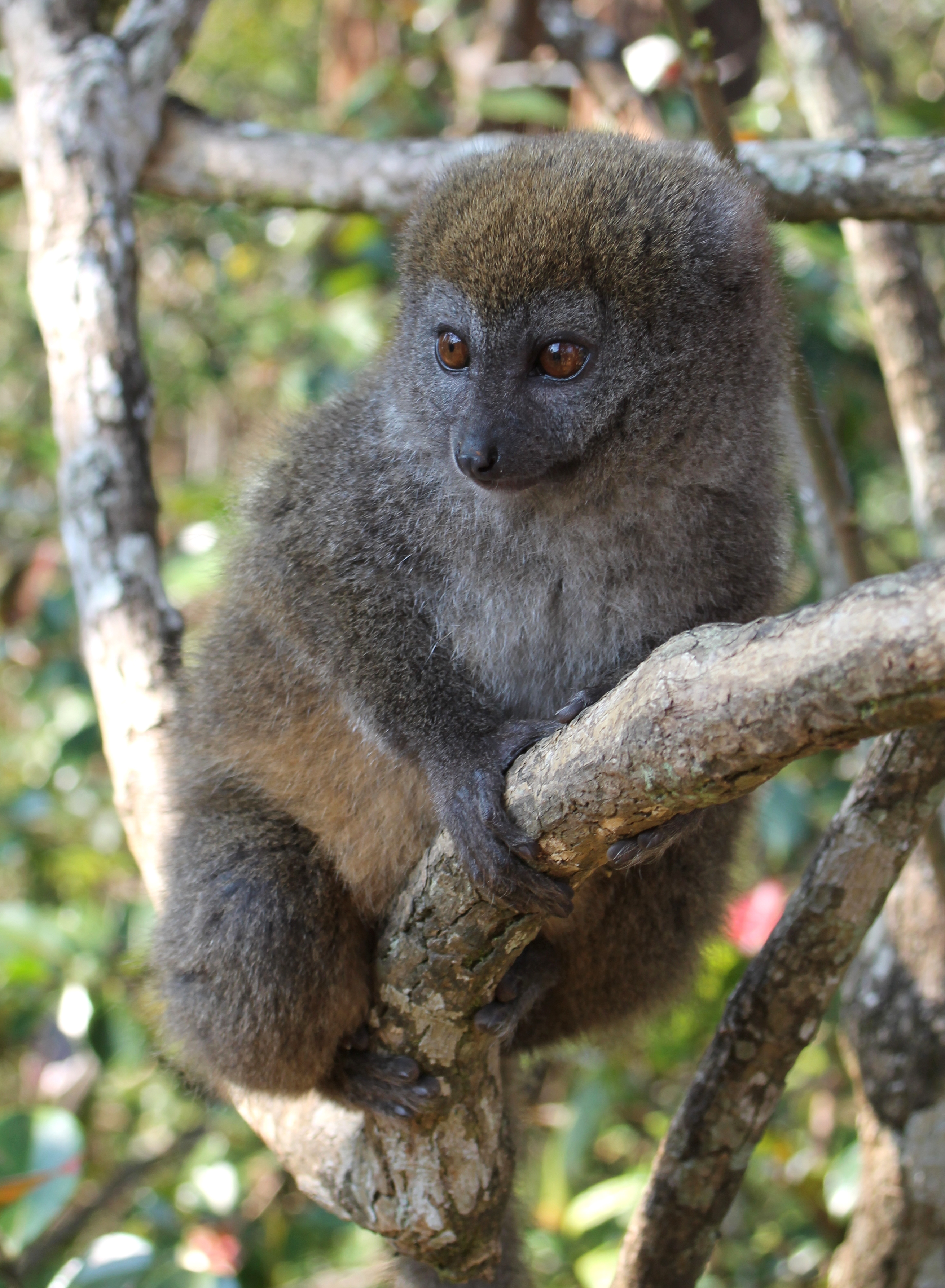 Grijze halfmaki op het Vakona-eiland